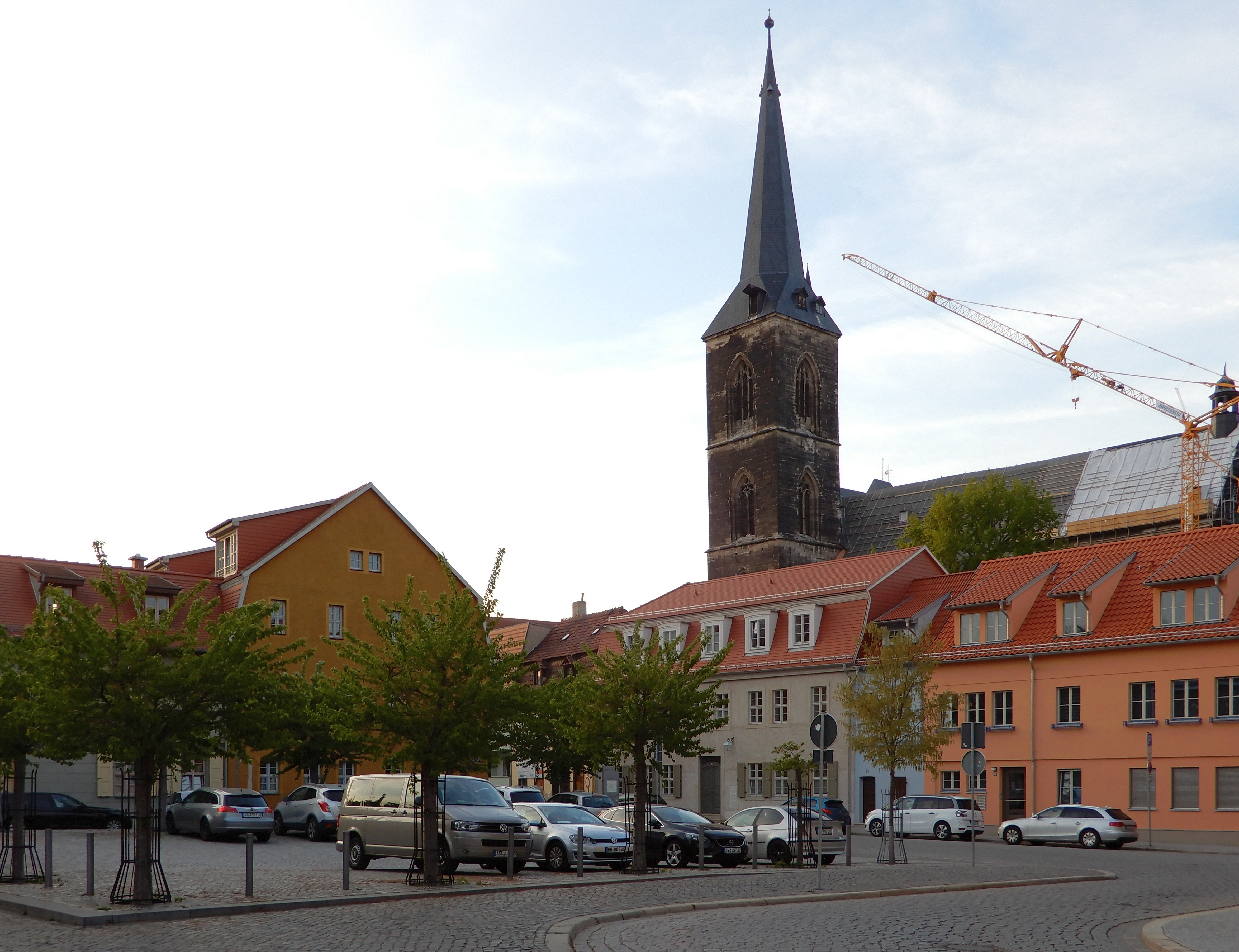 Der Platz Hopfenmarkt in Aschersleben